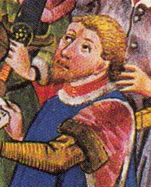 Albrecht von Sachsen-Wittenberg wird 1369 durch Kaiser Karl IV. mit dem Fürstentum Lüneburg belehnt. Ausschnitt einer Darstellung in der Lüneburger Sachsenspiegelhandschrift aus dem Jahr 1442.